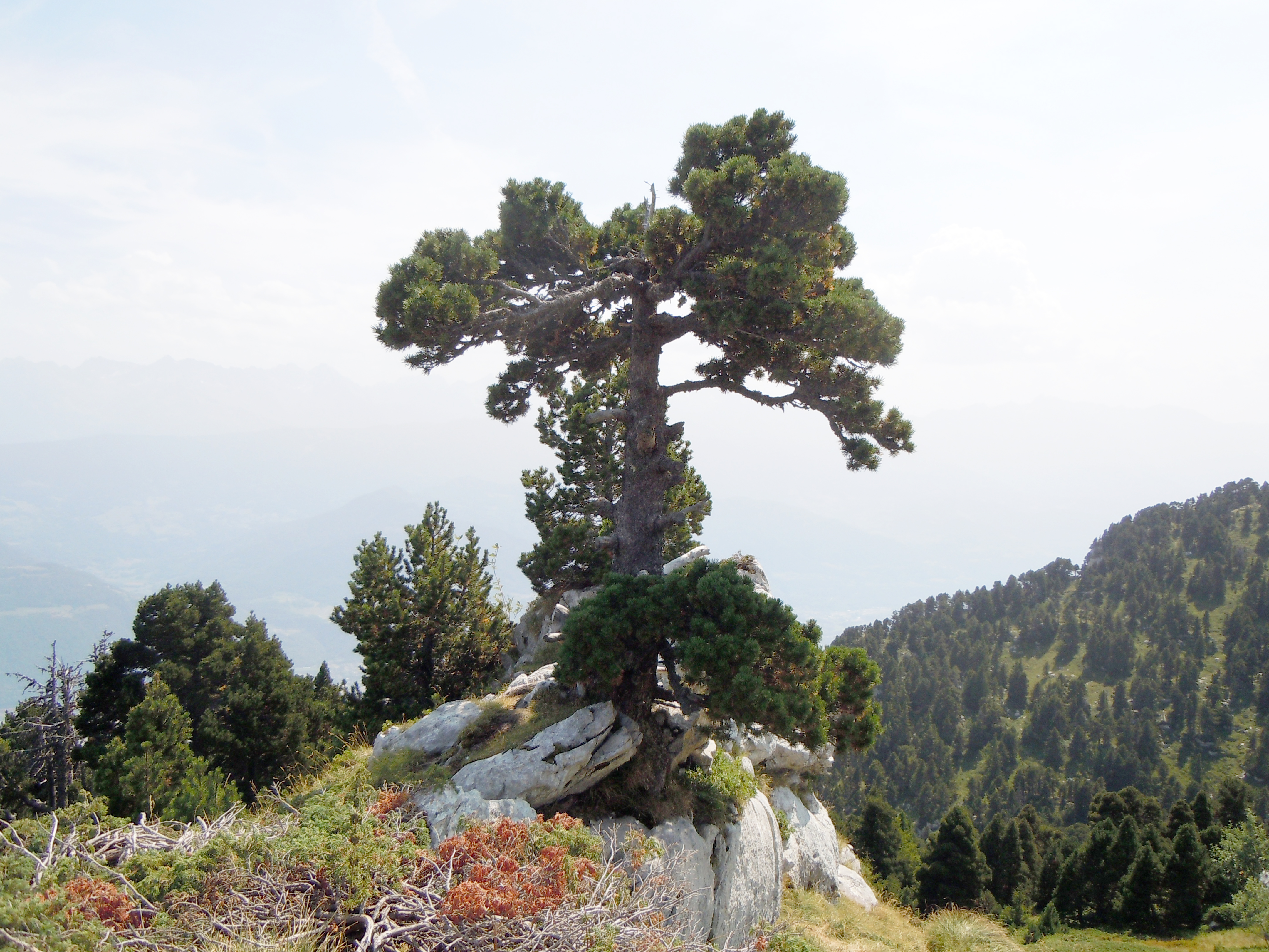 Pin à Crochets au Col de l'Alpe - Sainte-Marie-du-Mont en Isère